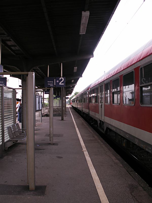 Rhein-Wupper-Bahn (RB 48)